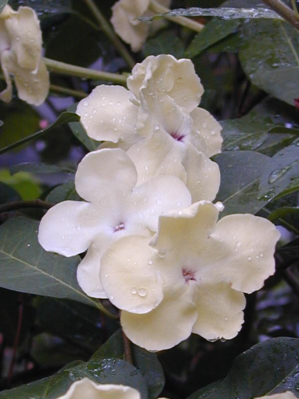 Brunfelsia pauciflora